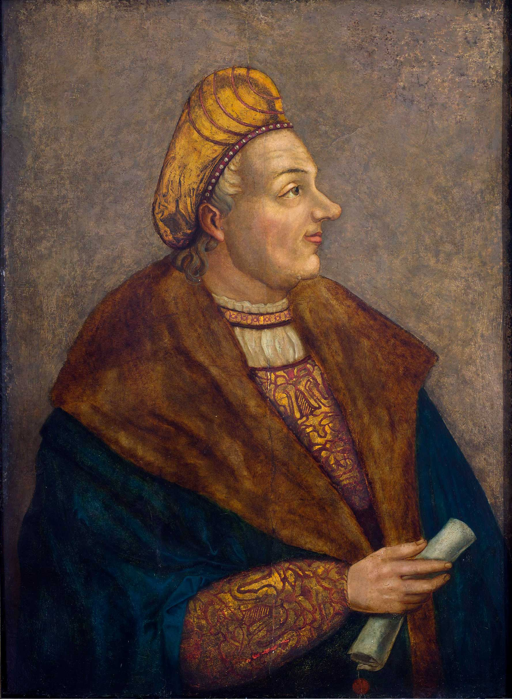 Беларуская (тарашкевіца): Партрэт караля польскага і вялікага князя літоўскага Жыгімонта Старога